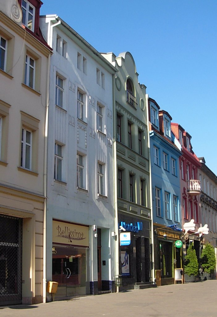 Ulica Magdzińskiego w Bydgoszczy